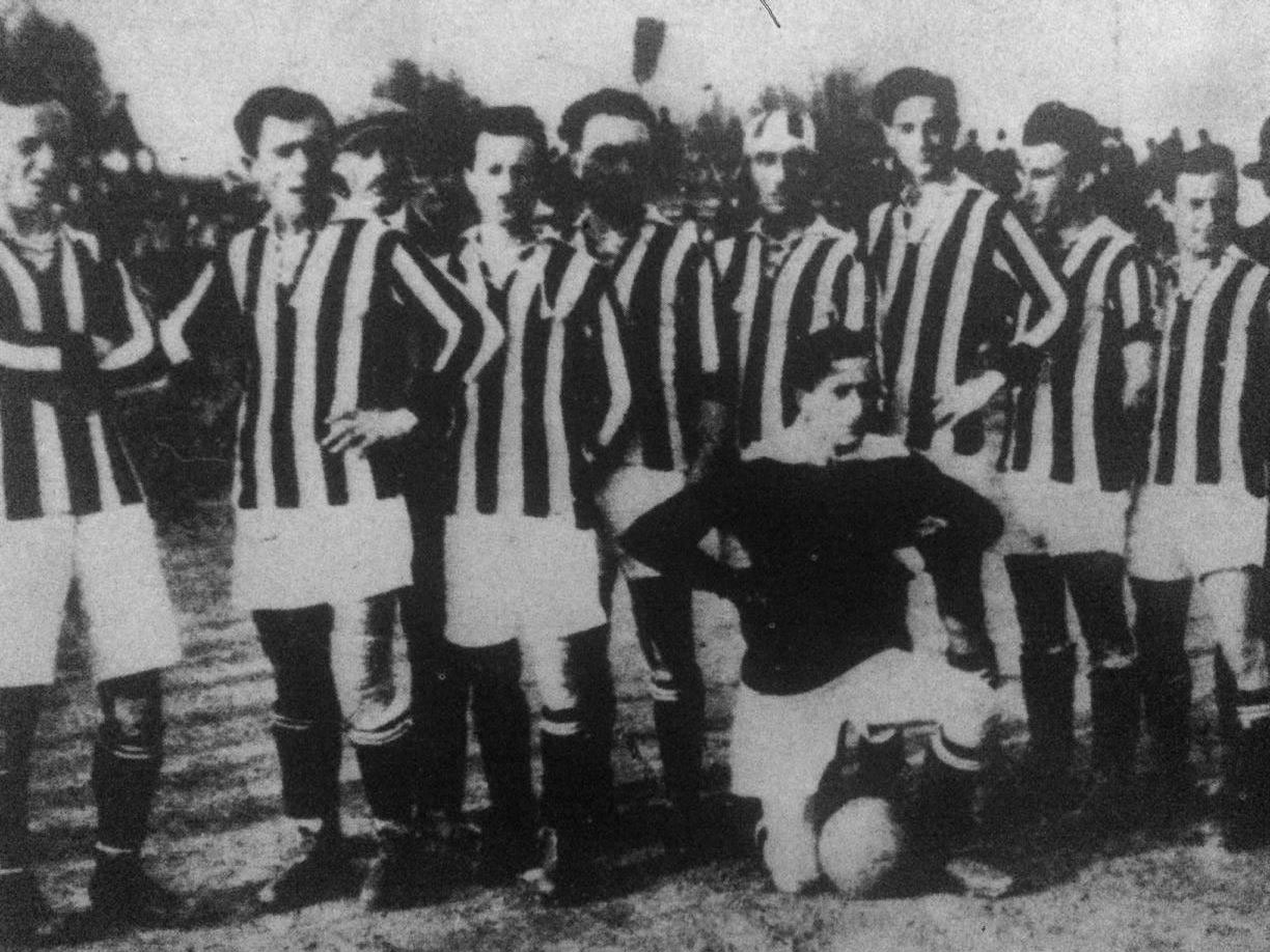 Una formazione della Juventus nella stagione 1920-21. Da sinistra, in piedi: G. Giriodi, A. Bruna, G. Debernardi, O. Novo, C. Bigatto (I), G. Marchi (II), P. Gilli, G. Grabbi (più Costa e P. Ferraris, fuori quadro); accosciato: G. Giacone.